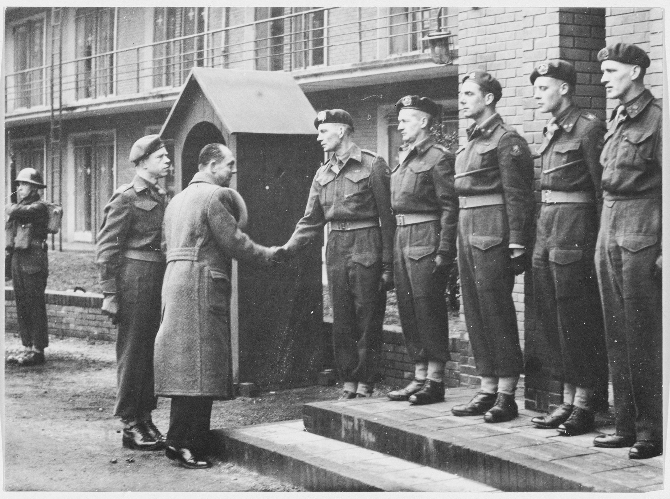 CollectieCollectie Fotoburo de BoerInventarisnummerNL-HlmNHA_54004515BeschrijvingDe Franse Minister Fievez wordt tijdens zijn bezoek aan de Stormschool Bloemendaal voorgesteld aan de officieren.FotonummerNL-HlmNHA_1478_0314DocumenttypeTopografische prenten, tekeningen en foto'sVervaardigerBoer, Cees de (1918-1985) Soort vervaardigerFotograaf PersonenFievez, A H J L Functies personenminister LandNederland ProvincieNoord-Holland GemeenteBloemendaal PlaatsBloemendaal StraatDonkerelaan Begindatum1948Einddatum1948TechniekFoto TrefwoordenMilitairen